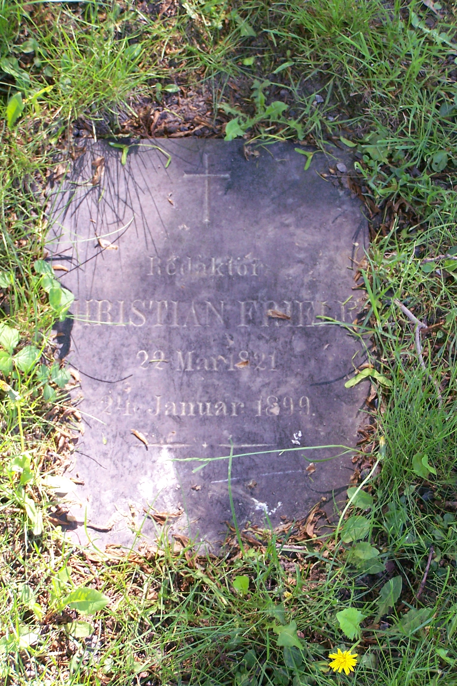 Tomb of Christian Fredrik Gotfried Friele at Vår Frelsers gravlund, Oslo